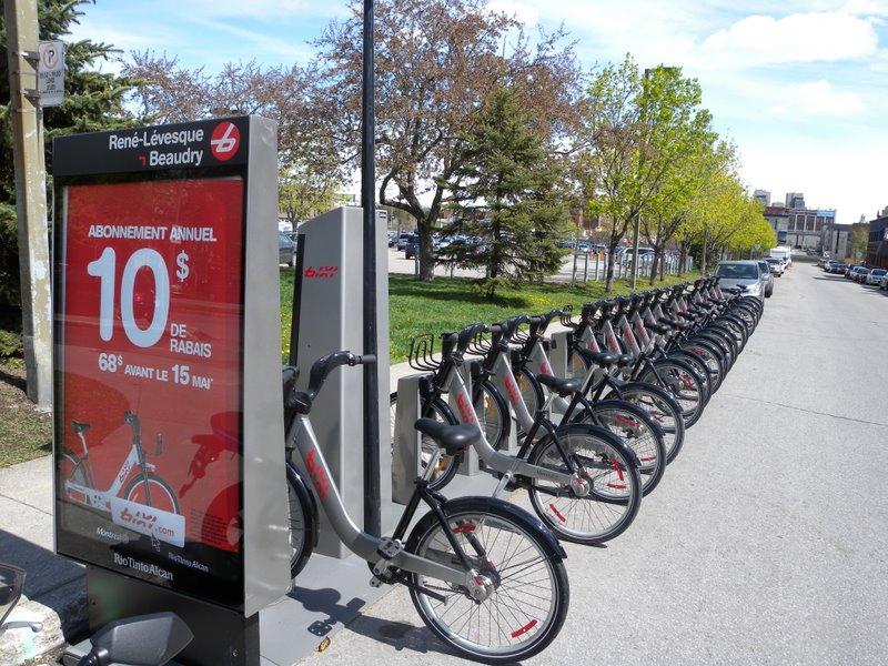 Station Bixi Boulevard René-Lévesque et rue Beaudry (Montréal QC)